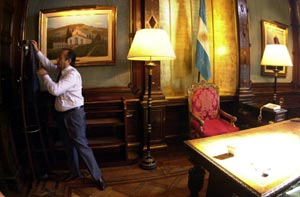 Rodríguez Saá en su despacho, antes de la Nochebuena; después viajó a San Luis, su provincia, y volvió ayer a la Casa de Gobierno